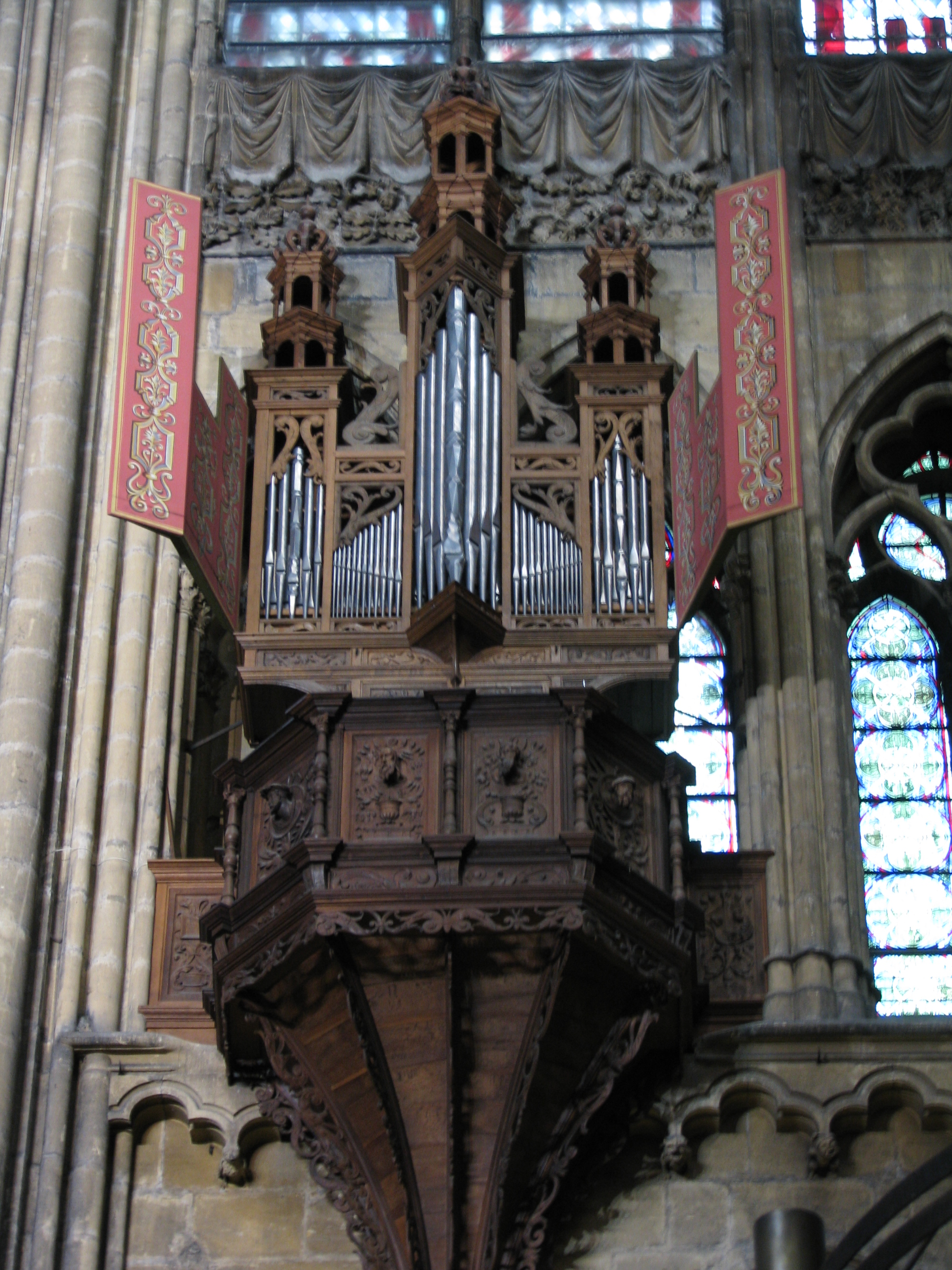 Metz place d'Armes, cathédrale saint Étienne, orgue Renaissance en nid d'hirondelle du triforium, présentant la particularité de posséder des panneaux en bois peint refermables.